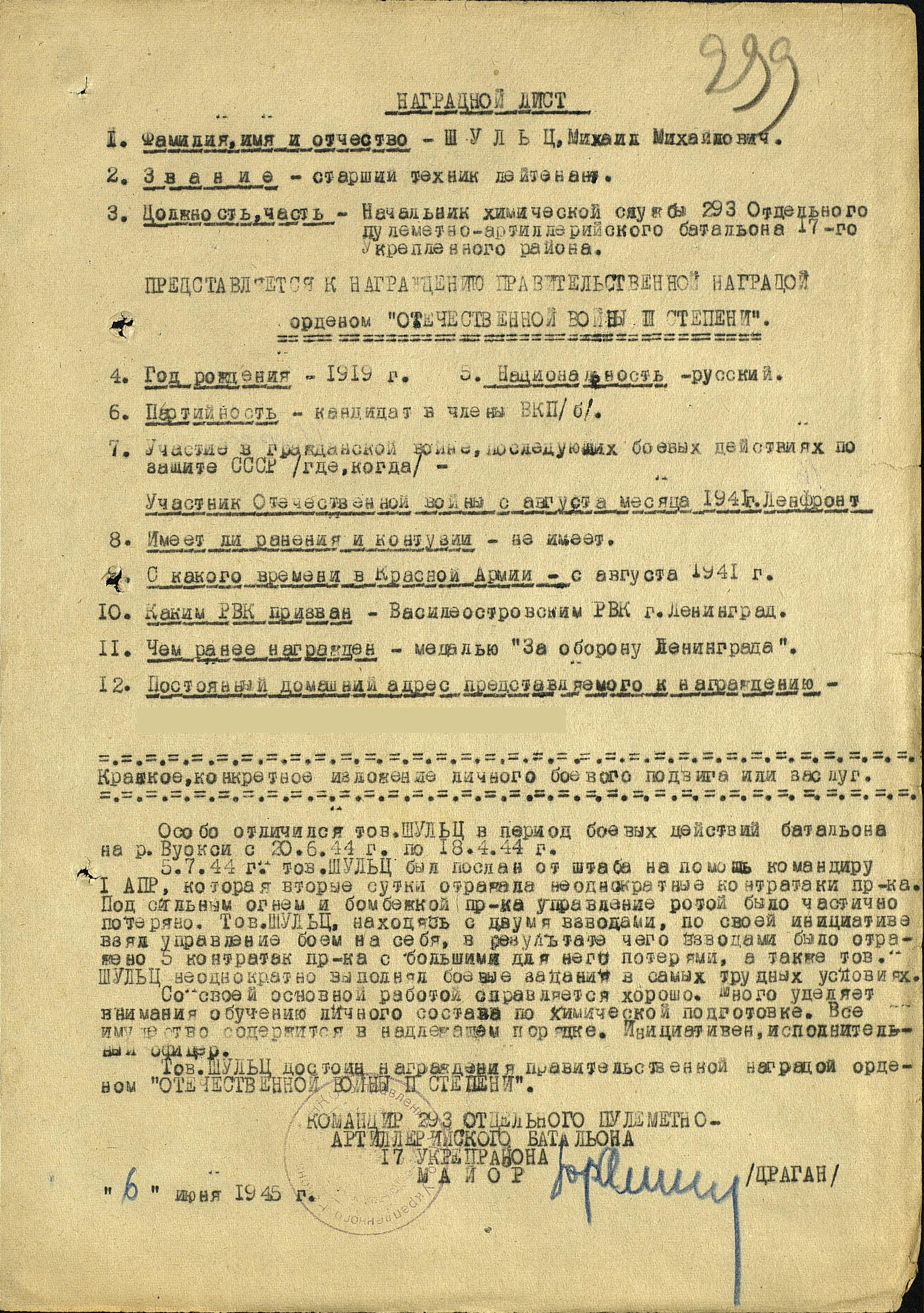 Наградной лист Михаила Михайловича Шульца